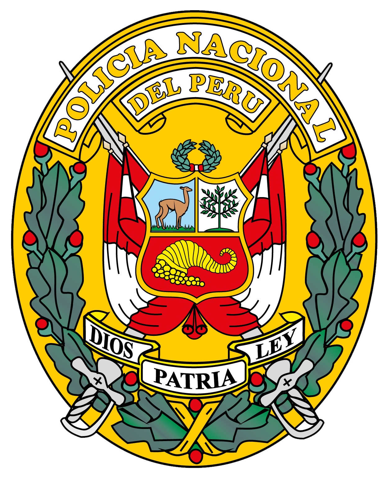 Escudo de la Policía Nacional del Perú fundada el 6 de diciembre de 1988 tras la unificación de las fuerzas policiales (Guardia Civil, Guardia Republicana y Policía de Investigaciones del Perú).